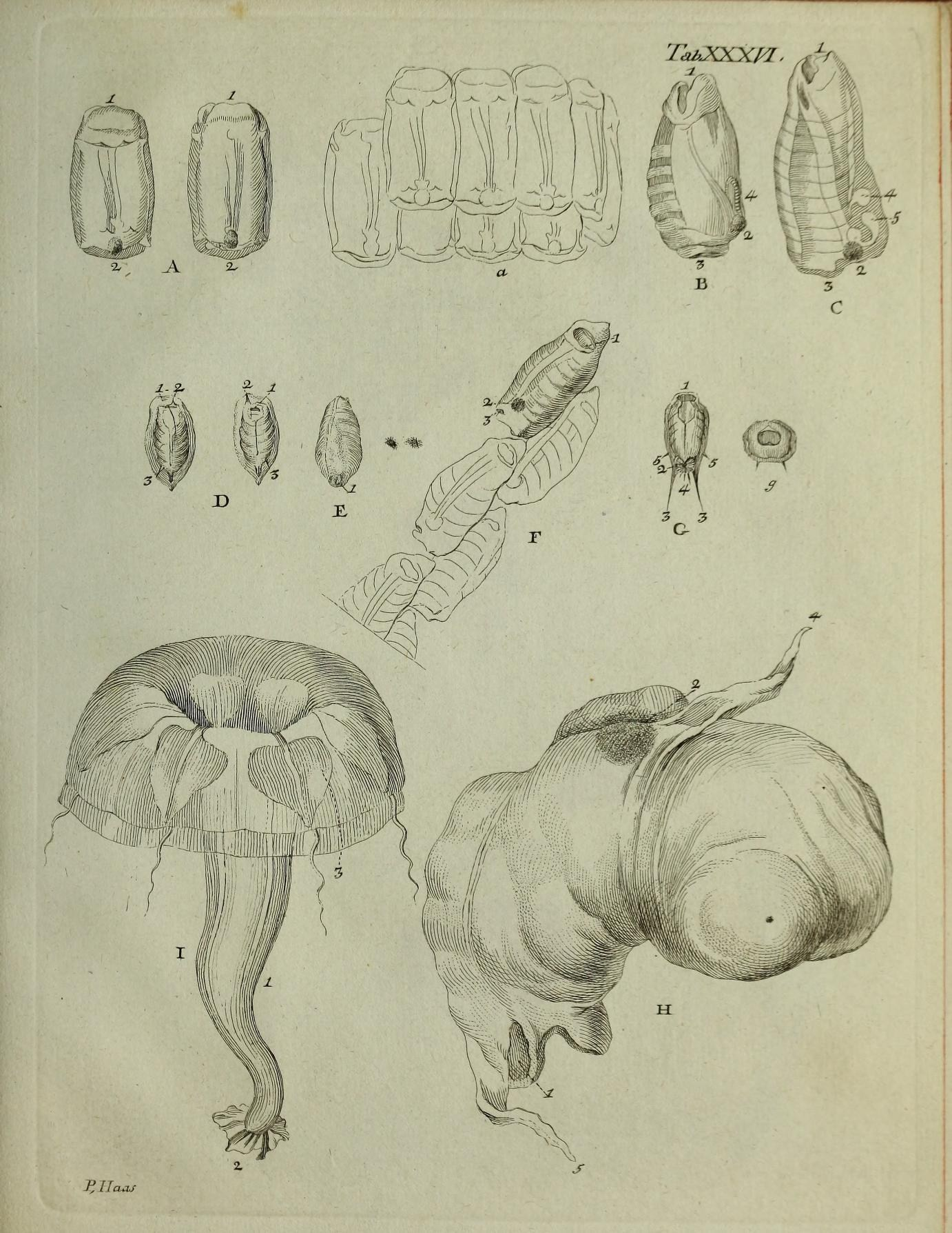 TabXXXfl. Af- i.jji£^ Plfaat